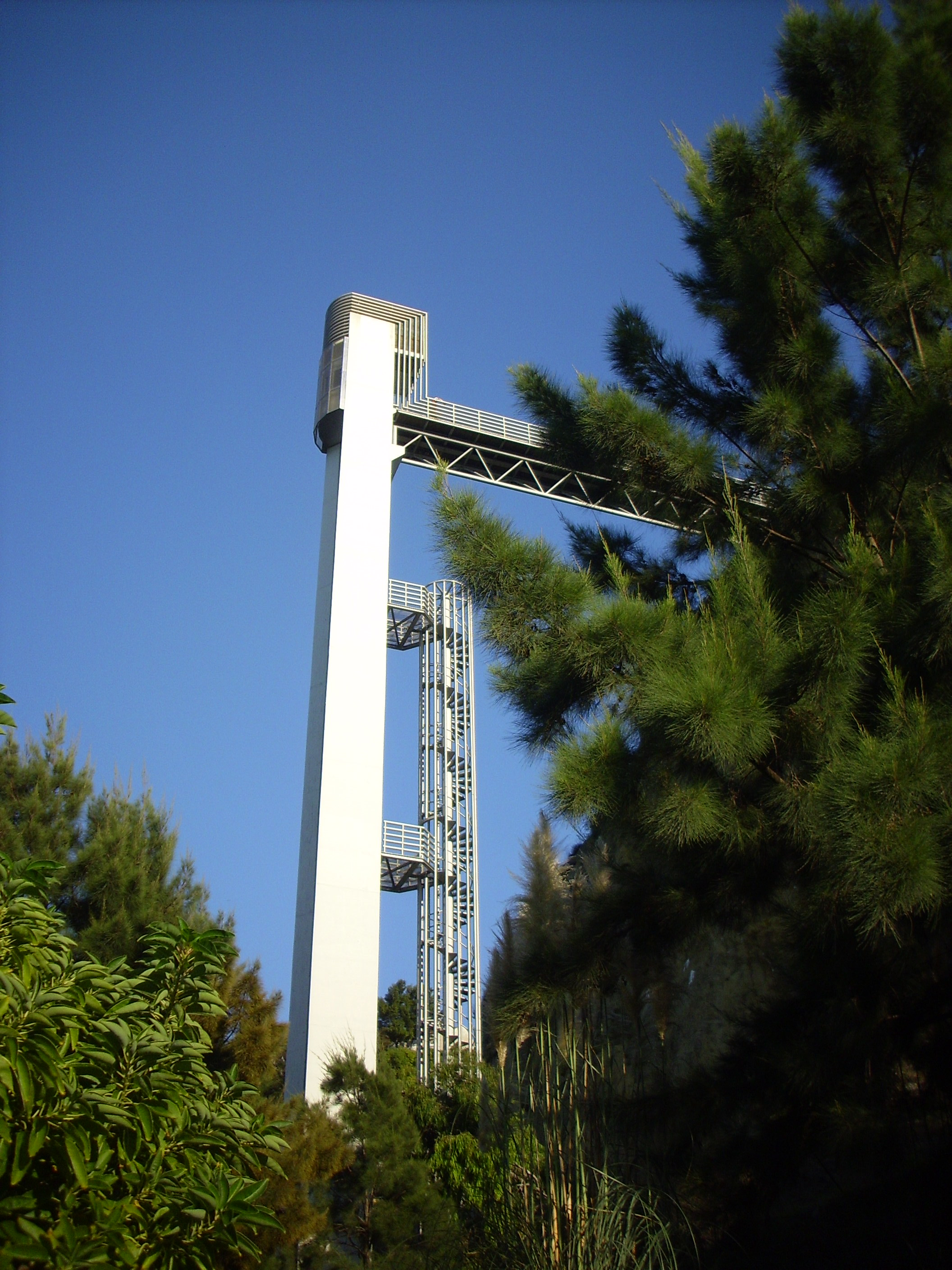 Acesso ao jardim ribeirinho - Almada